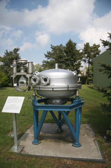 Erster Monochromator für Synchrotronstrahlung am DESY-Beschleuniger; im Hintergrund Blasenkammer, um Elementarteilchen sichbar zu machen. Veröffentlichung mit freundliche Genehmigung DESY, Hamburg.